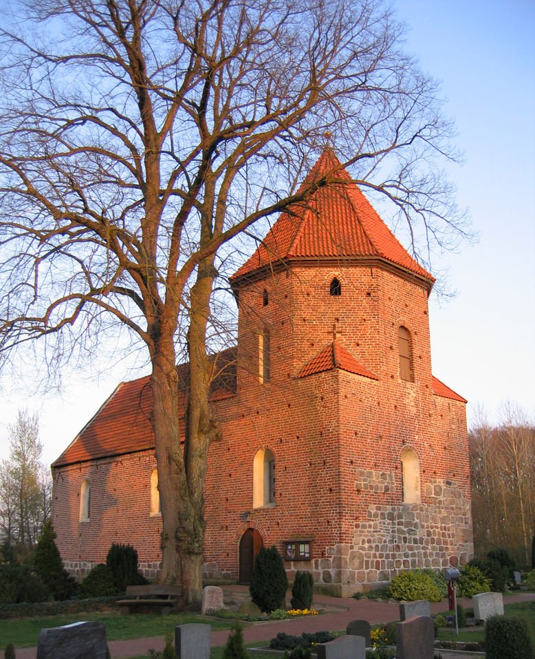 St.-Briccius-Kirche Huntlosen, Außenansicht